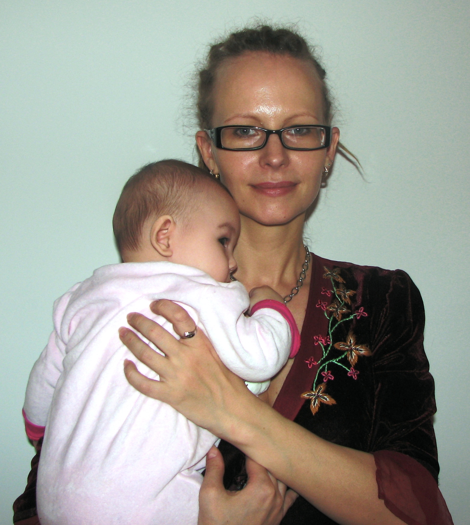 Kerttu Rakke (sündinud 1970) on eesti proosakirjanik.